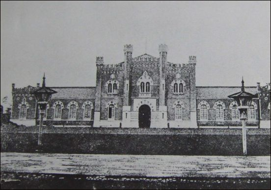 Ancien bâtiment du musée militaire Yūshūkan (1881-1923).